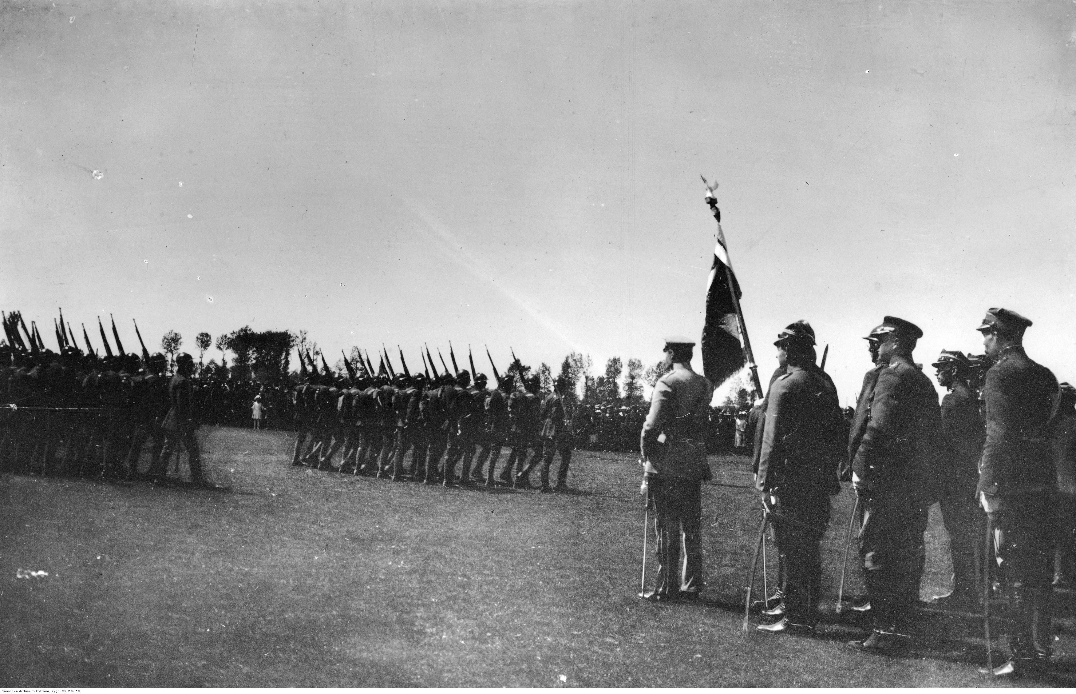 Marszałek Józef Piłsudski odbiera defiladę oddziałów piechoty.